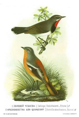 Calliope pectoralis tschebaiewi p.44 pl.9 fig.1 Phoenicurus alaschanicus p.44 pl.9 fig.2